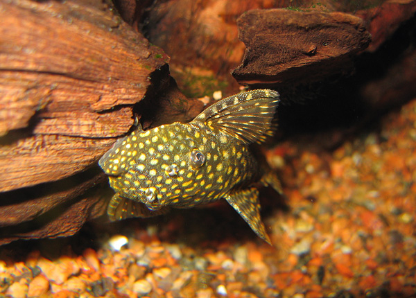 Bristlenose pleco, female (Ancistrus)